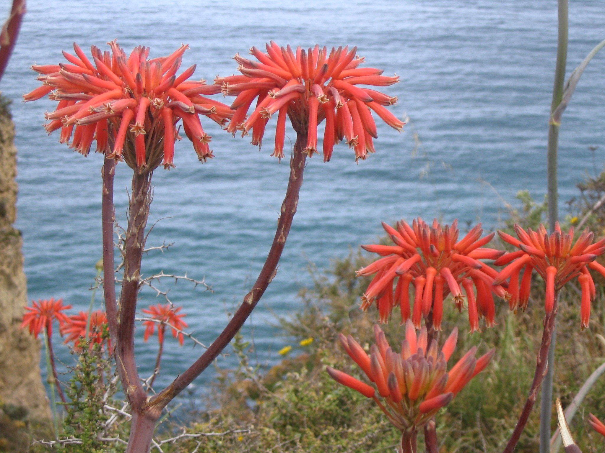 Aloe saponaria ou Aloe maculata - Punta de la Piedade - Algarve - Portugal